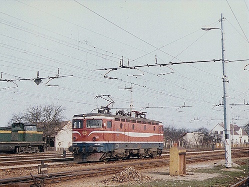 JZ-Lok 441-607 in Dobova, Systemwechselbahnhof 3kV=/25kV~